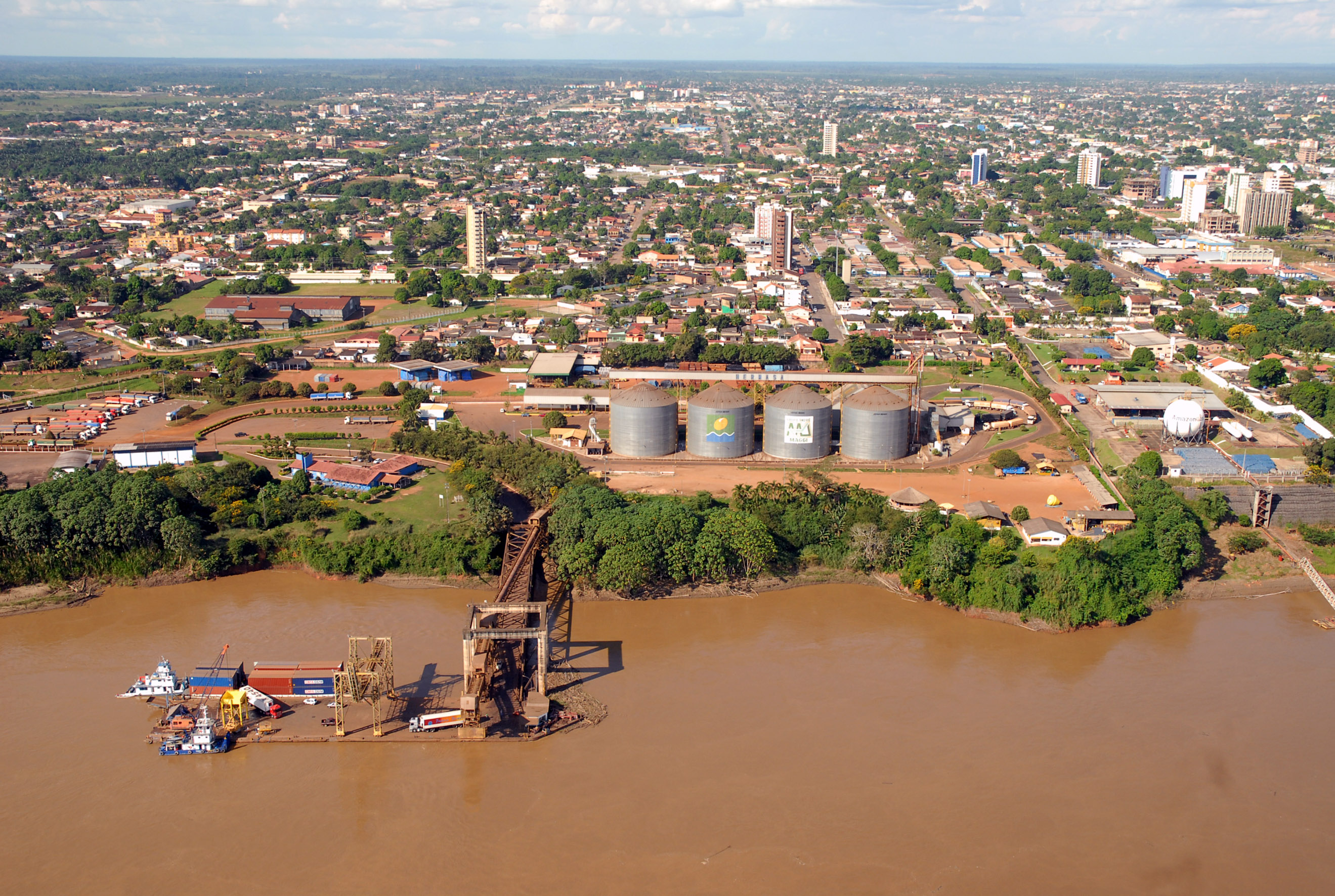 Porto Velho, Rondônia - Vista aérea da capital de Rondônia, às margens do Rio Madeira.